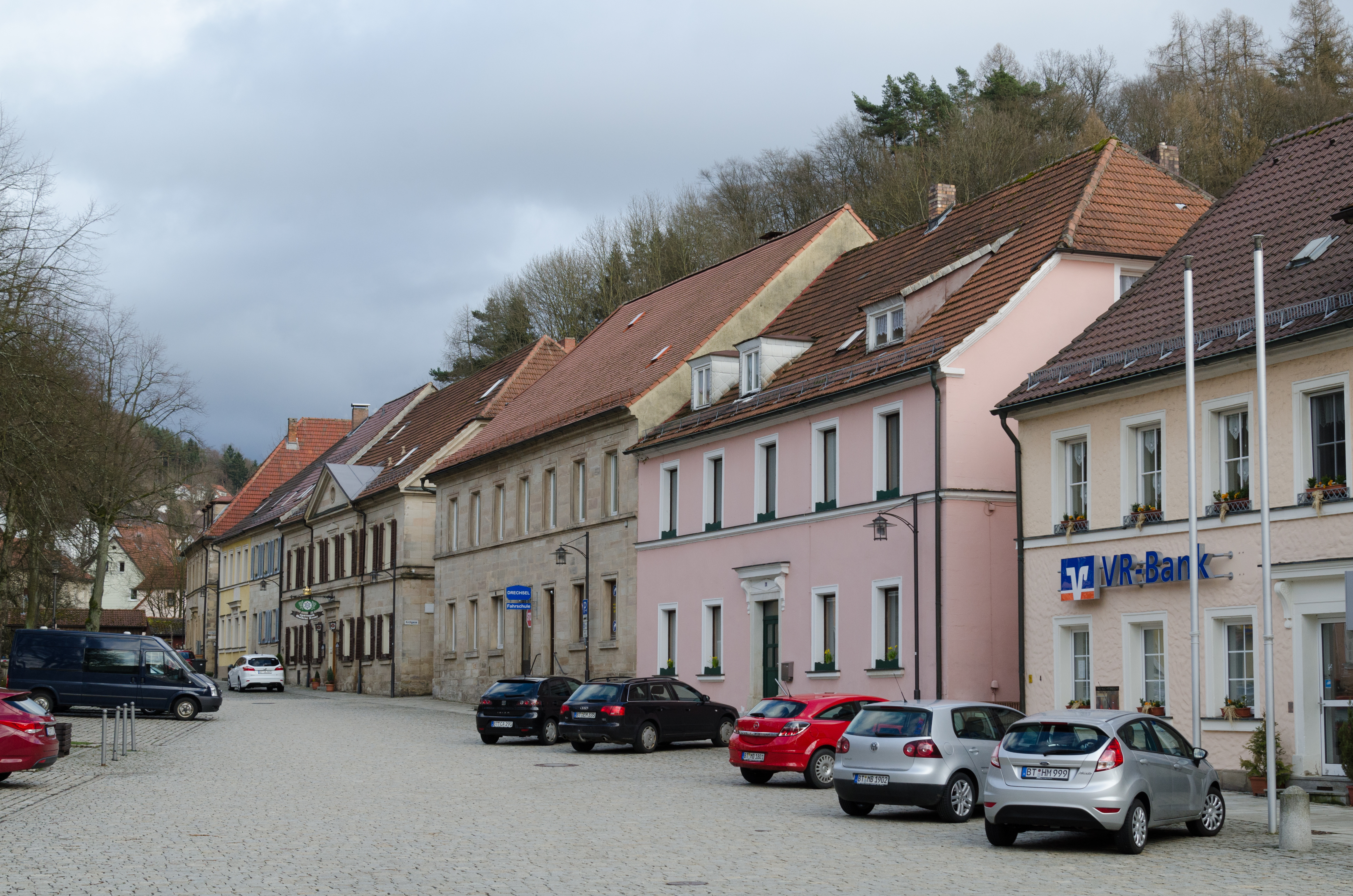 Goldkronach, Marktplatz 16 bis 4